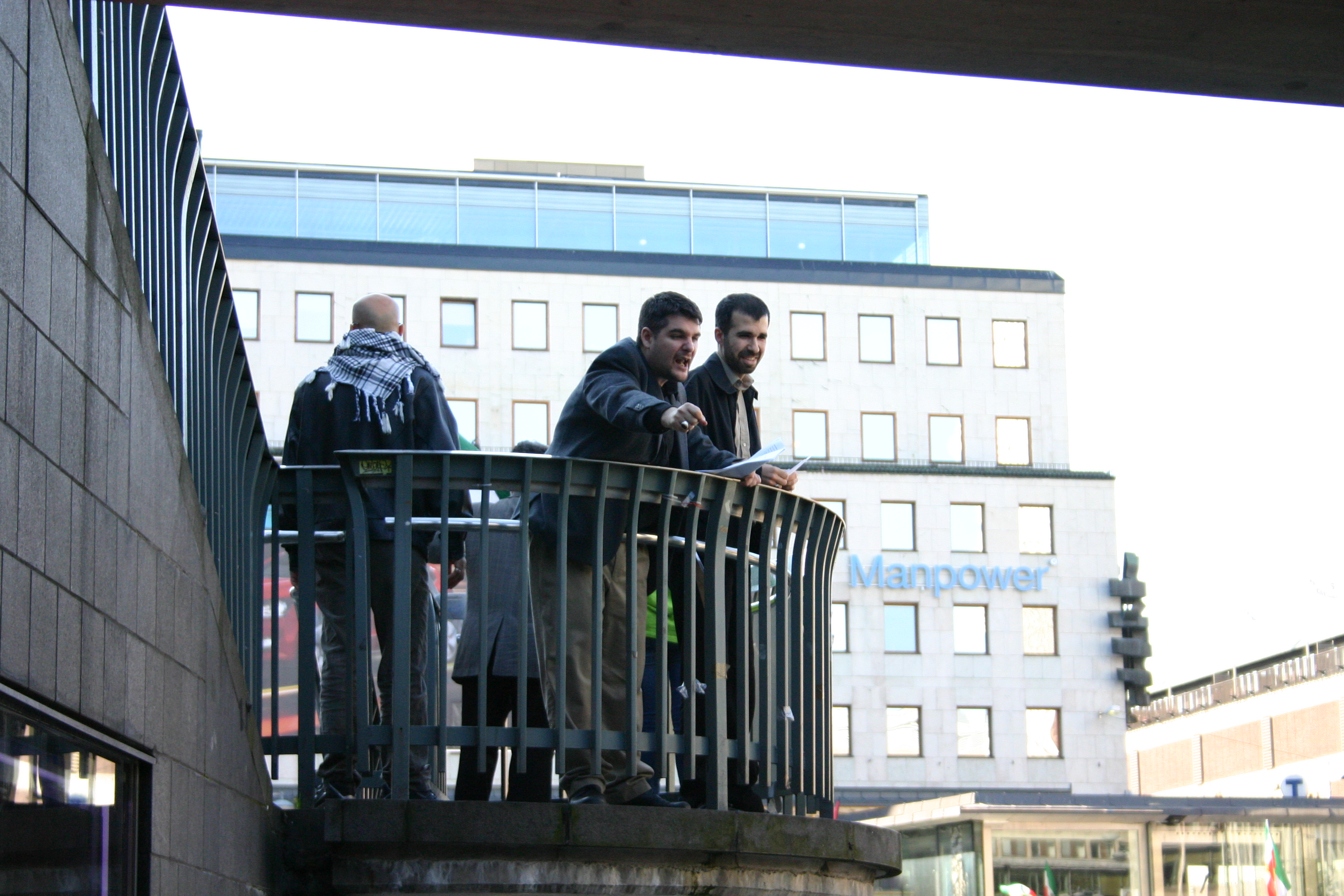 På reklamen som spridits via nazistiska hemsidor kallades demonstrationen "antijudisk". Själva ville de hellre titulera sig som antisionister. Demonstrationen arrangerades av Al Quds-kommittén och lockade mestadels muslimer, men också en handfull nationaldemokrater och nynazister. Talare var Mohammed Omar och Lasse Wilhelsson, båda förintelseförnekare. Demonstrationen omringades av motdemonstranter som skanderade slagord, och polisen fick spärra av en stor del av torget samt stänga av Klarabergsgatan på grund av den stora folksamlingen. Några personer fick omhändertas efter att de kastat bl.a. ägg mot demonstrationen, som avslutades vid 16-tiden.